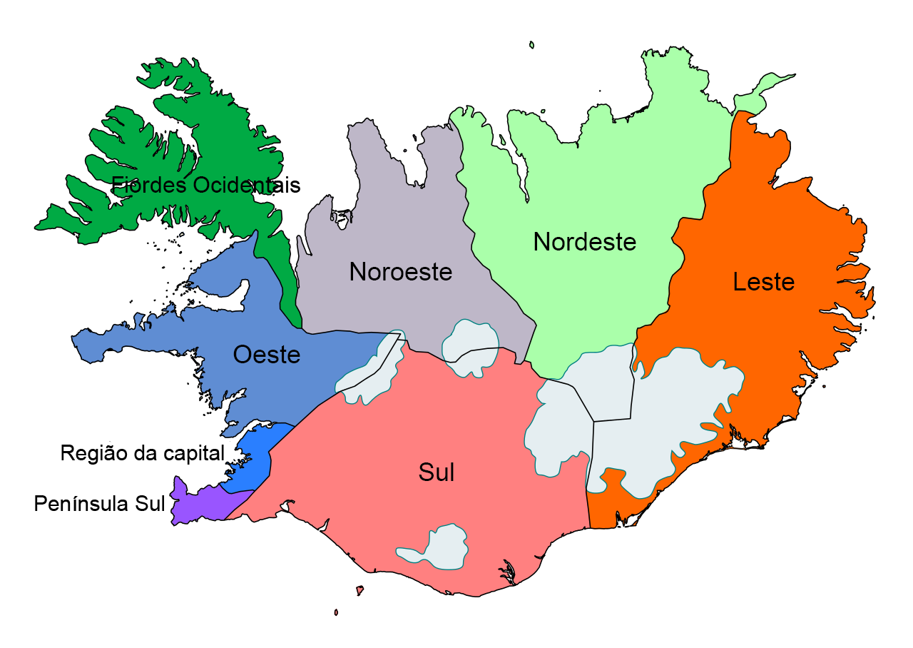 Regiões da Islândia em Português